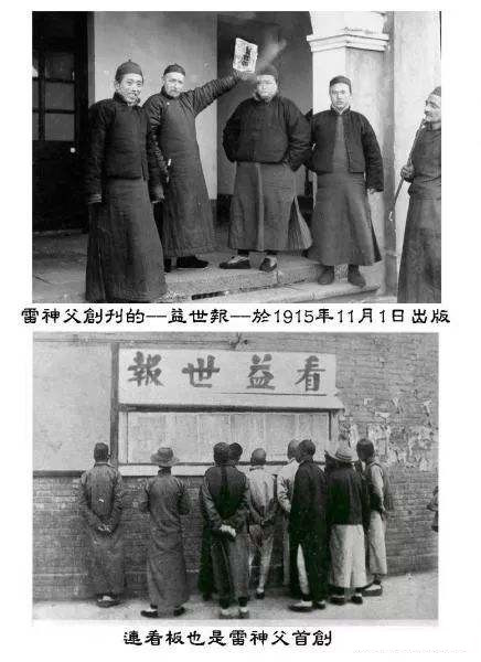 Le prêtre belge lazariste, Vincent Lebbe en 1915 en Chine et le journal yishi bao (益世報)